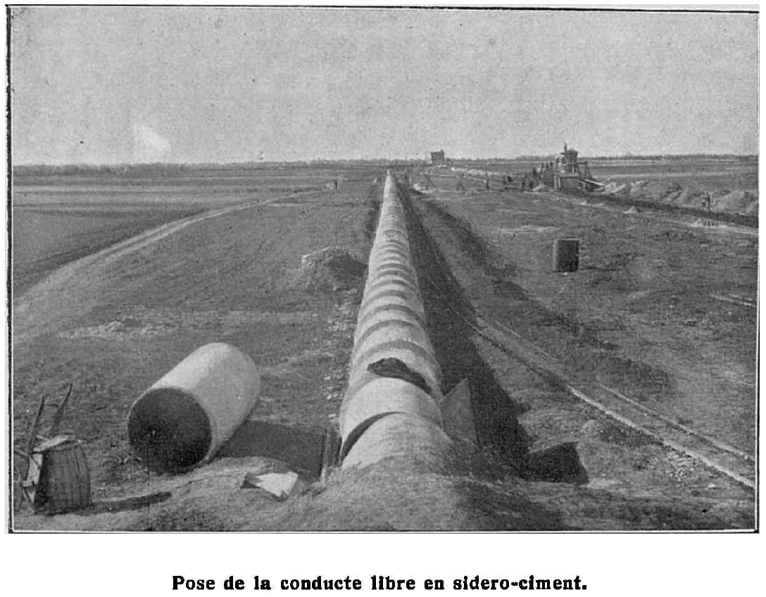 Imagine de la realizarea alimentării cu apă a Bucureștiului (România), în primul deceniu al secolului XX